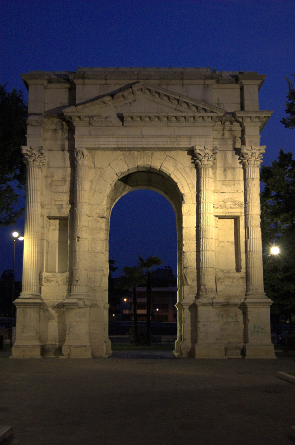 Una foto notturna dell'Arco dei Gavi a Verona